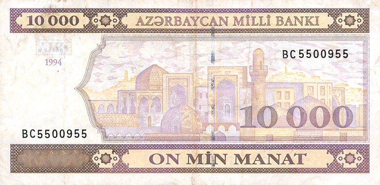 10.000 manat